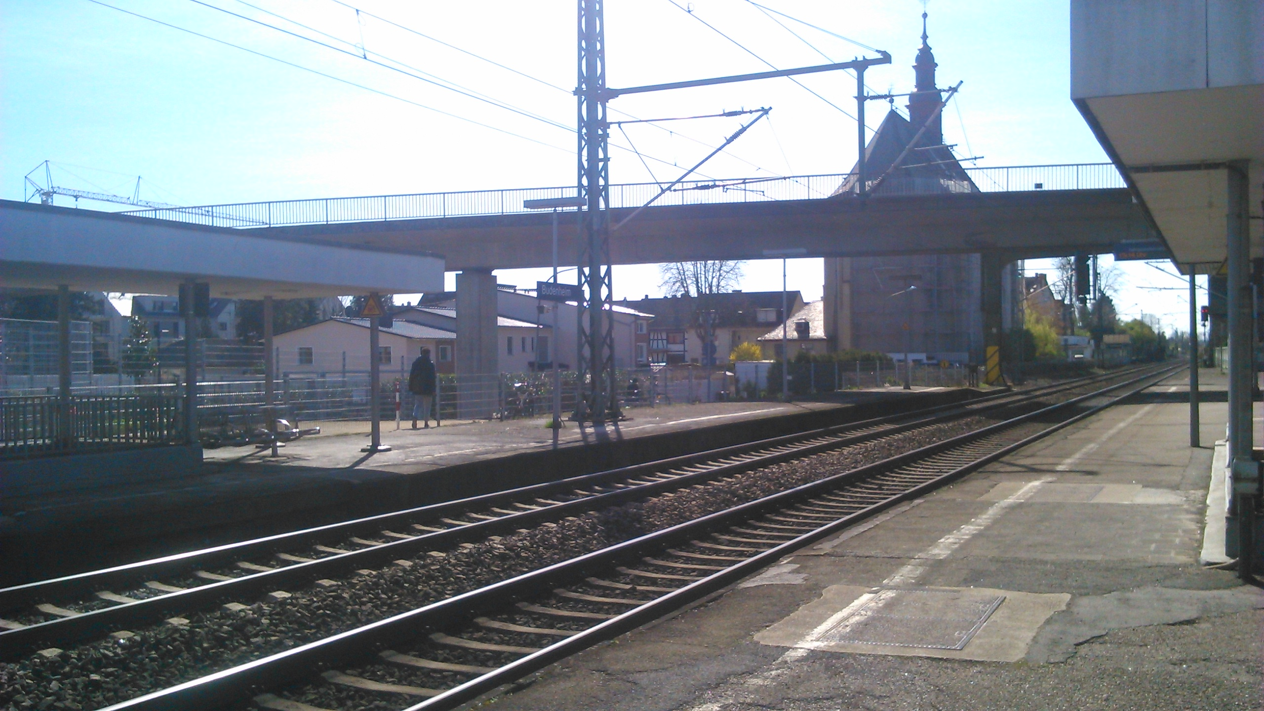 Budenheimer Bahnhof, Blick in Fahrtrichtung Bingen. Im Hintergrund die Pankratiuskirche.